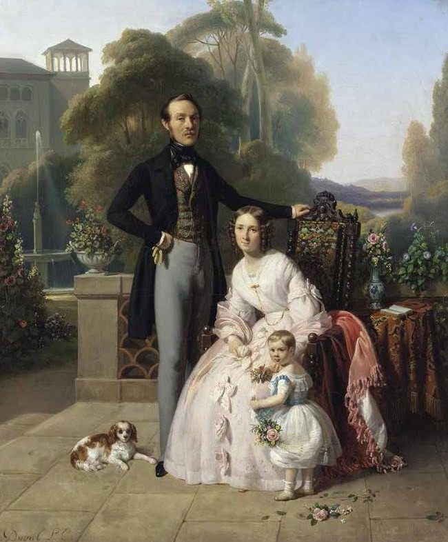 Иван Михайлович Скоропадский с женой Елизаветой Петровной Скоропадской (урождённой Тарновской) с дочерью Натальей.